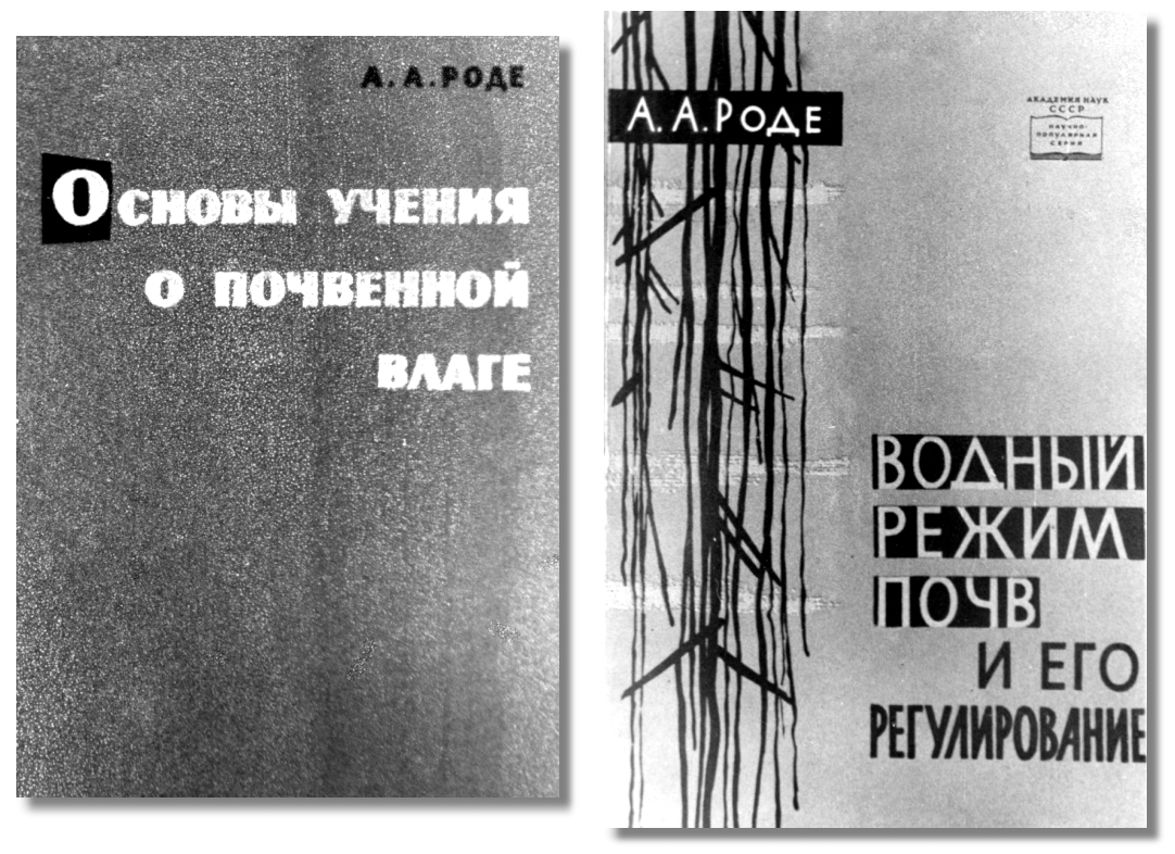 Книги А. А. Роде.